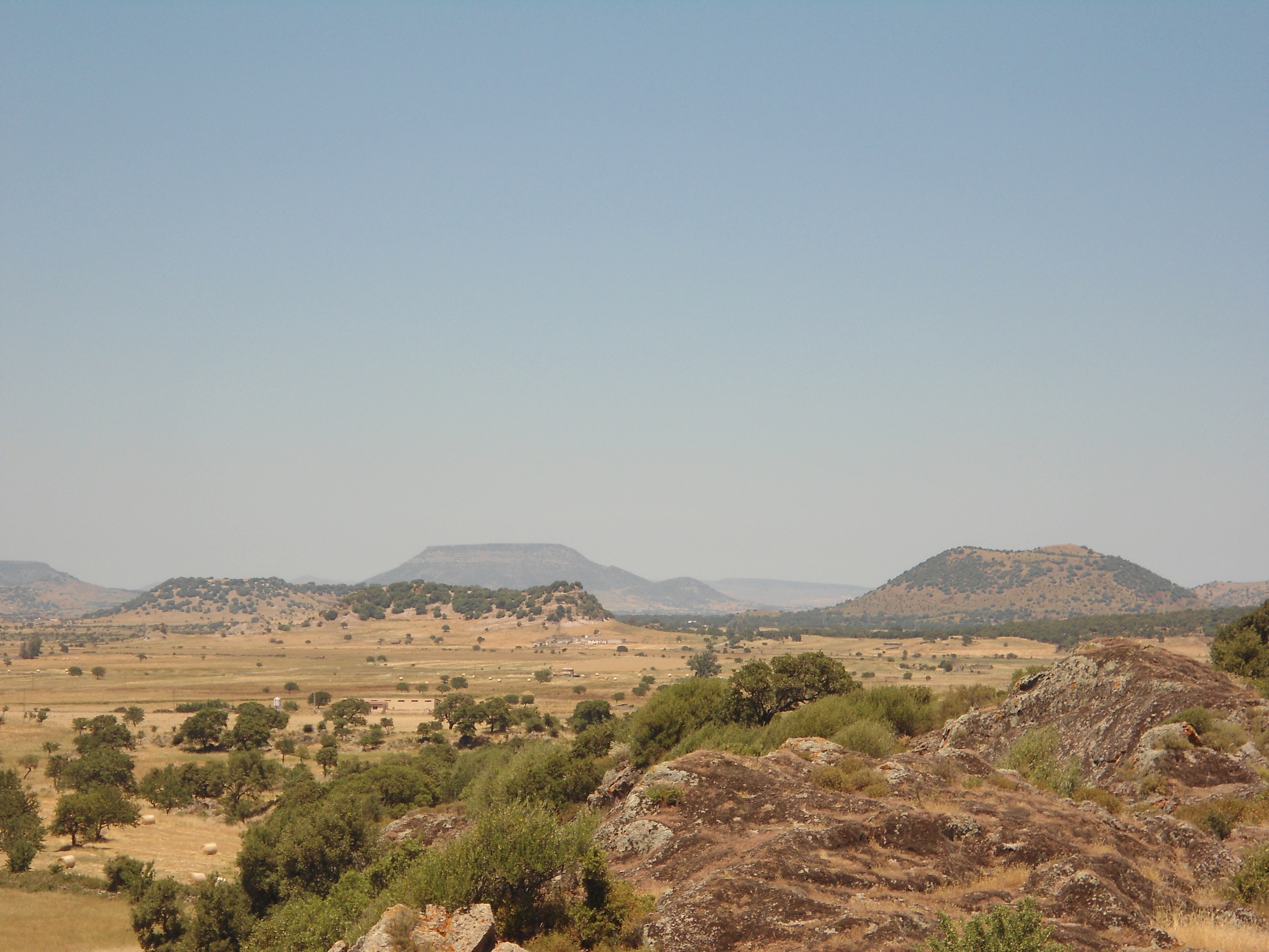 Necropoli Sant'Andrea Priu This is a photo of a monument which is part of cultural heritage of Italy.